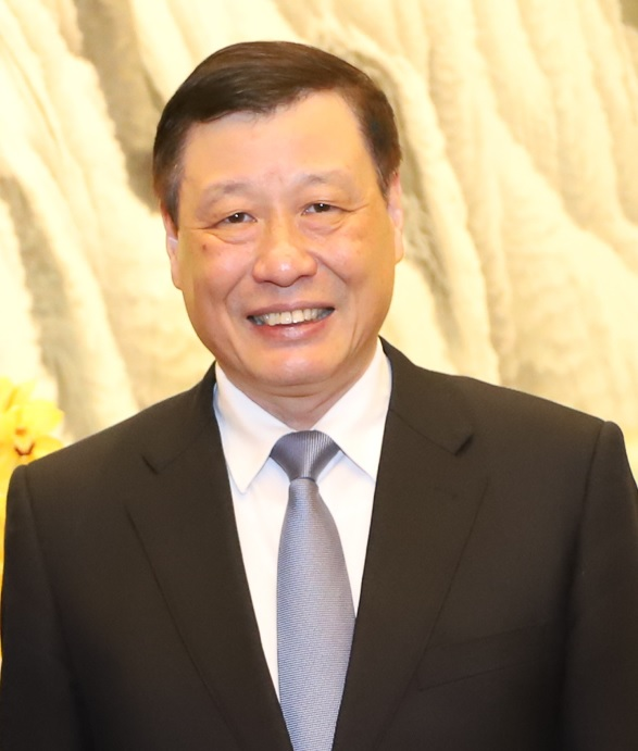 2019年5月20日，上海市市长应勇会见来华出席中国巴西高层协调与合作委员会第五次会议的巴西联邦共和国副总统莫朗。